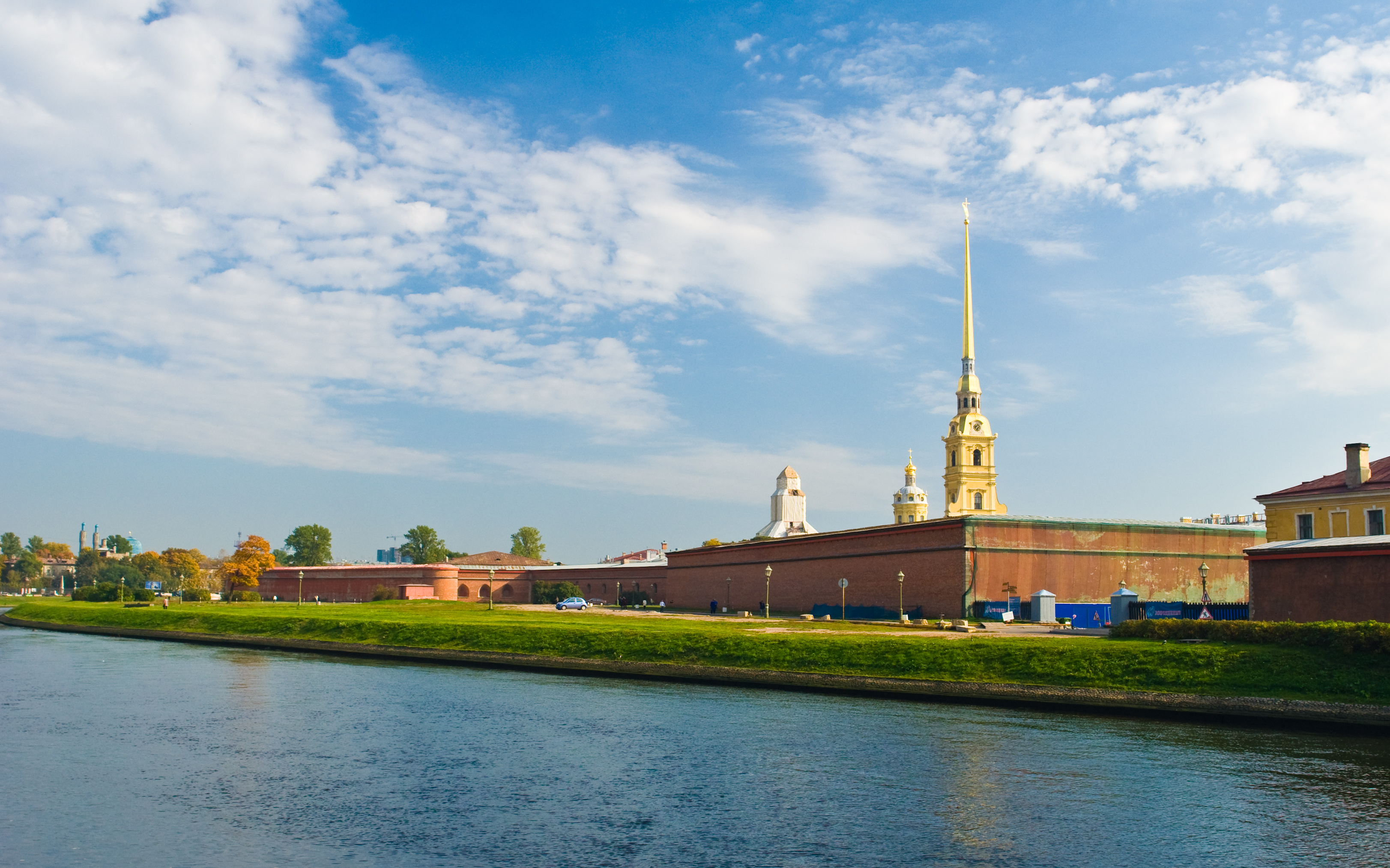 Петропавловская крепость, вид со стороны кронверка.